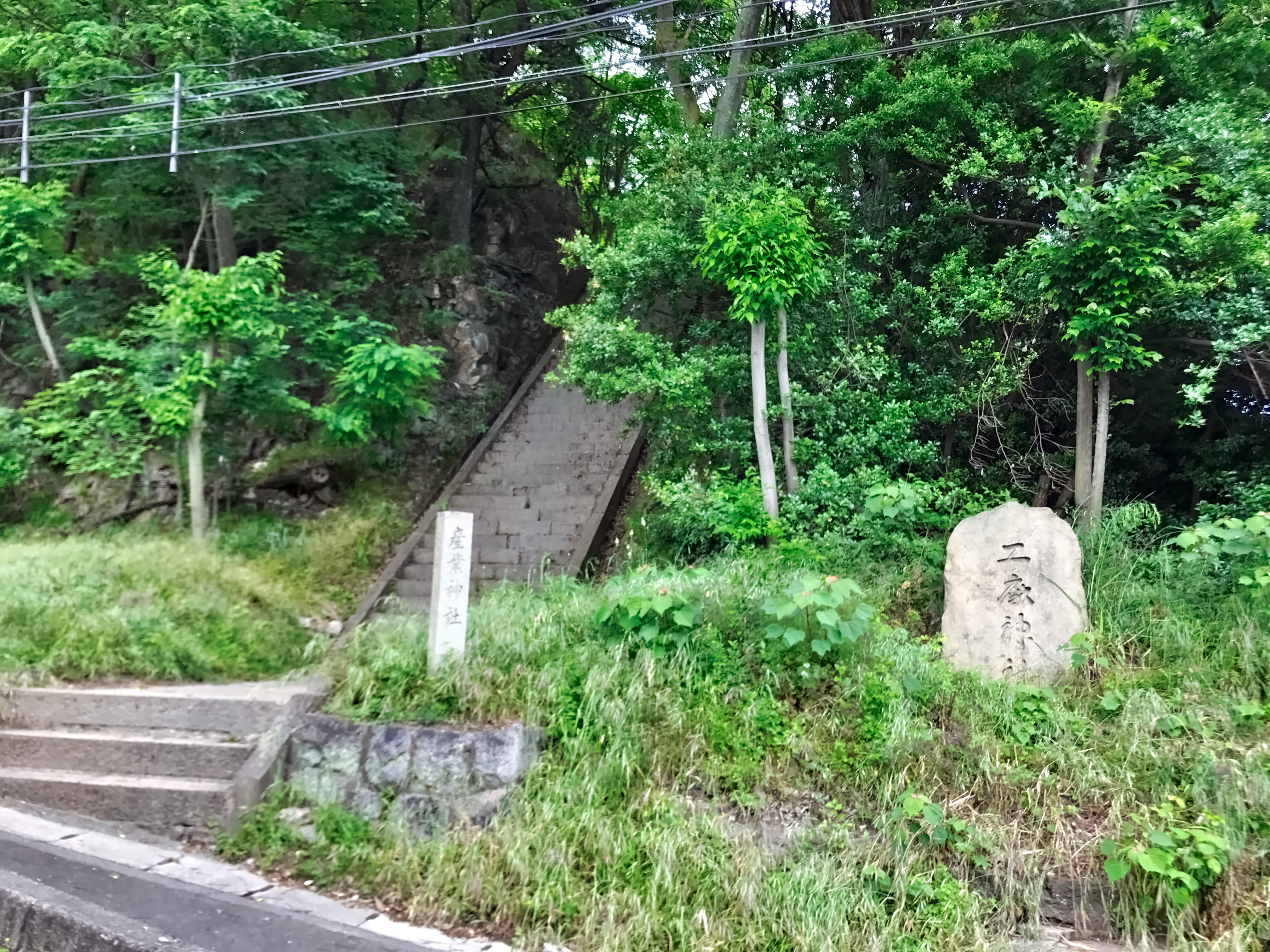 工廠（旧産業）神社